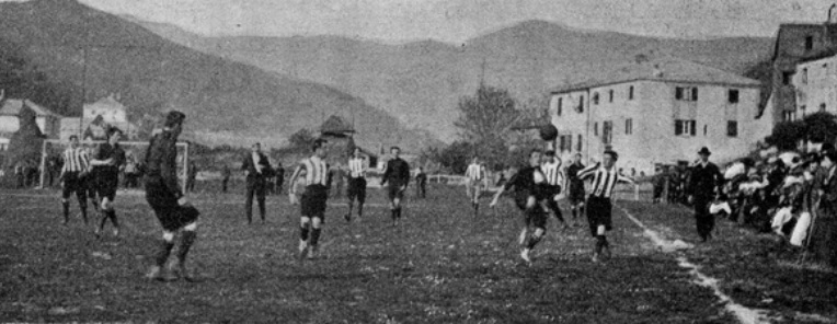 Genova, campo sportivo di Ponte Carrega, 13 aprile 1903. Fase di gioco della gara tra Genoa e Juventus (3-0), finale del Campionato Italiano di Football 1903.